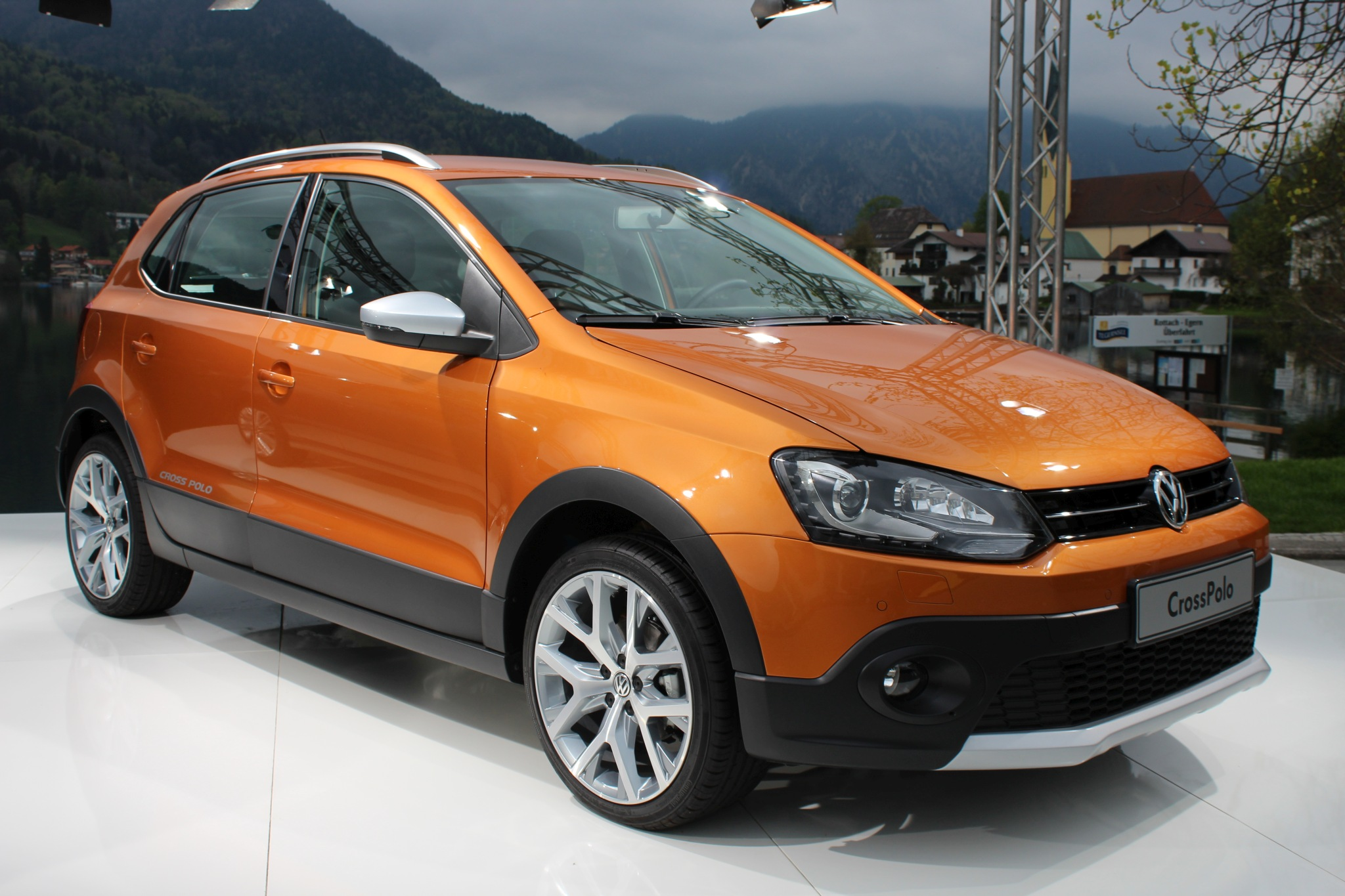 Facelift of VW Polo 2014 meistens gezeigt: VW Polo Bluemotion 1.2 TSI 7 Gang DSG Automatik 66 KW (9o PS) Ausstattungsvariant "Polo Fresh" (nur bis Ende 2014 verfügbar) Leergewicht 1.107 Kg max. 1.620 - 1.650 Kg Höchstgeschw. 186 KM/h Beschleunigung 7,1s oder 10,8 (Manuelle Schaltung / DSG)